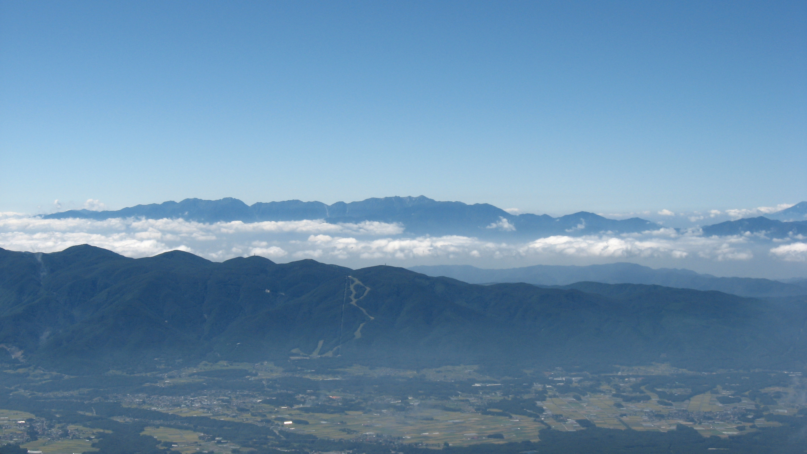 阿弥陀岳より中央アルプス